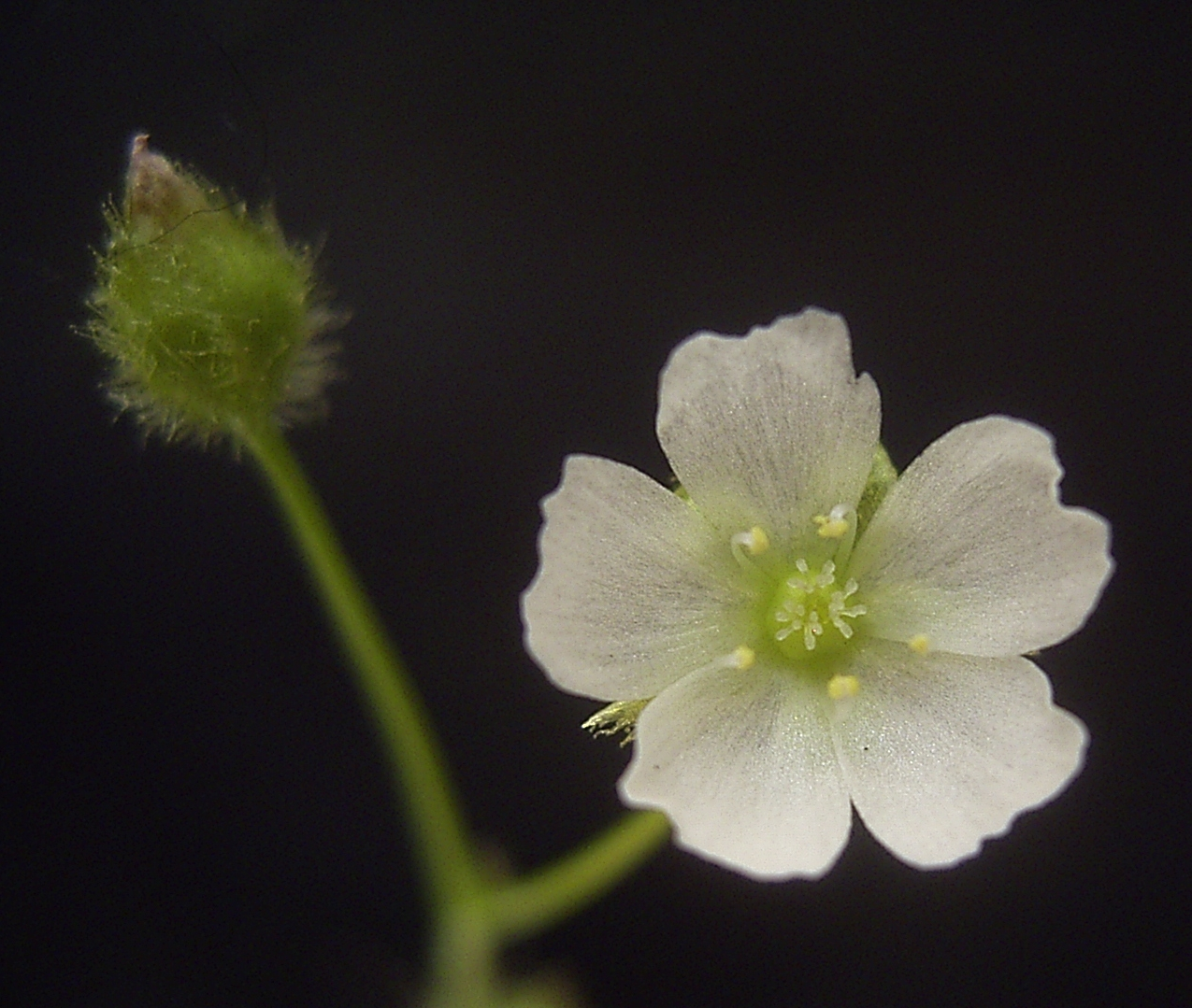 Flora Drosera peltata